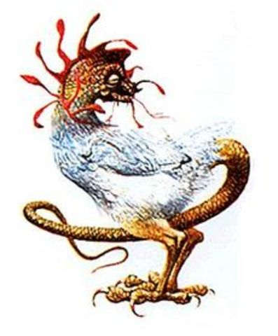 Disegno di un Bisso Galeto